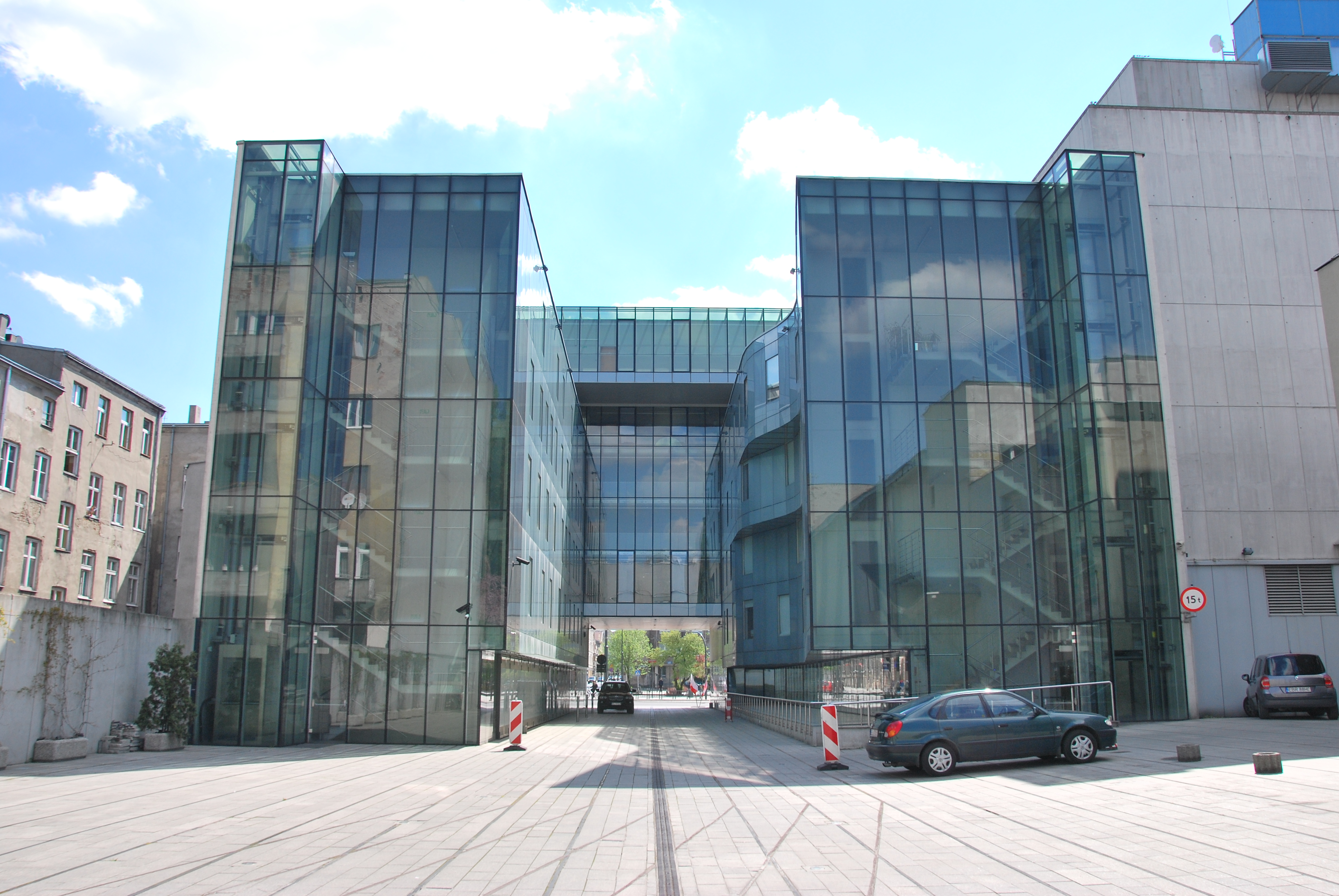 Filharmonia im. Artura Rubinsteina w Łodzi